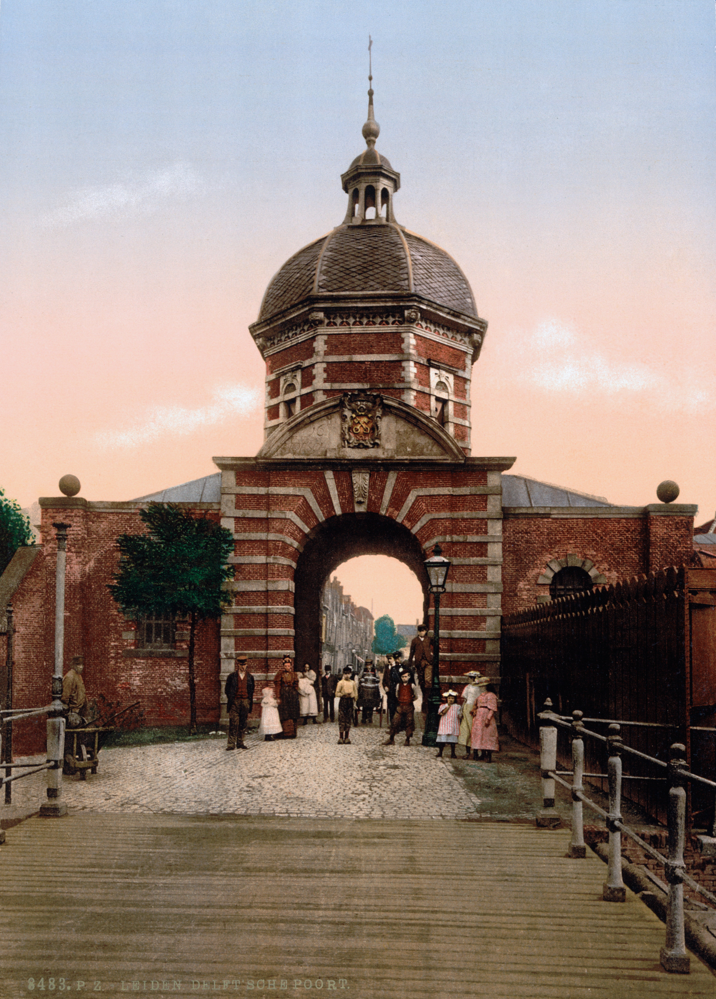 Leiden - Morspoort